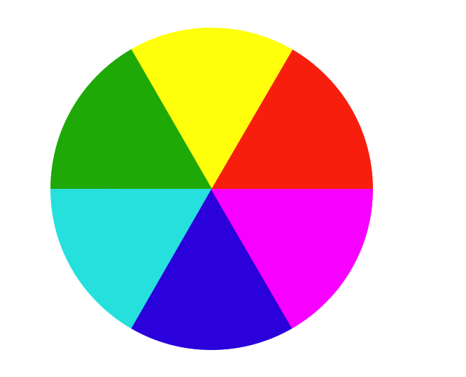 Der sechsteilige Farbkreis besteht aus den drei Primärfarben der additiven Farbmischung Rotorange, Blauviolett und Grün und aus den drei Primärfarben der subtraktiven Farbmischung Gelb, Magenta und Rot. Diese einfache Farbkreis entsteht in Anlehnung an das Farbensechseck von Harald Küppers.